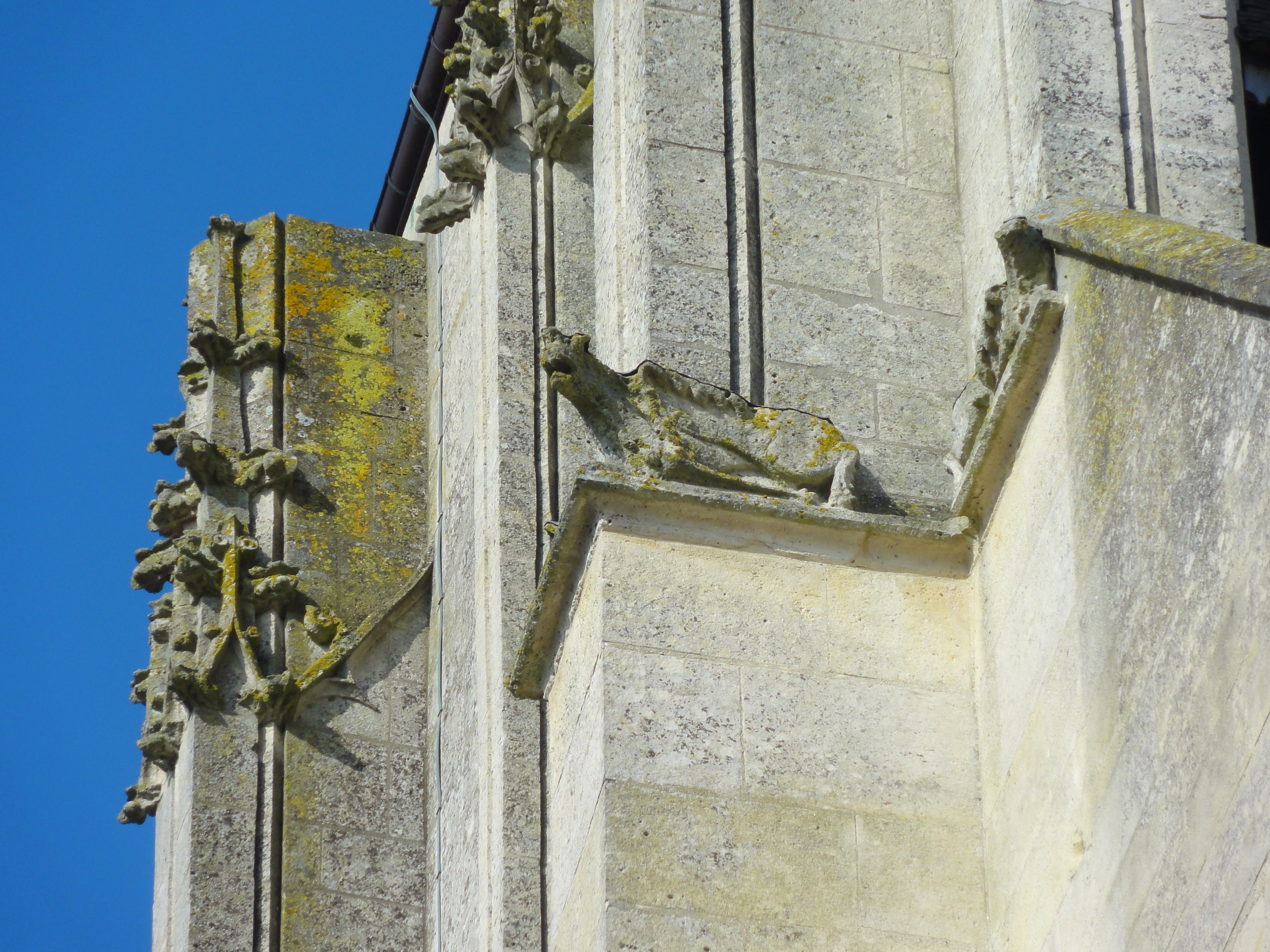 Église Saint-Michel du Mesnil-en-Thelle - voir titre.